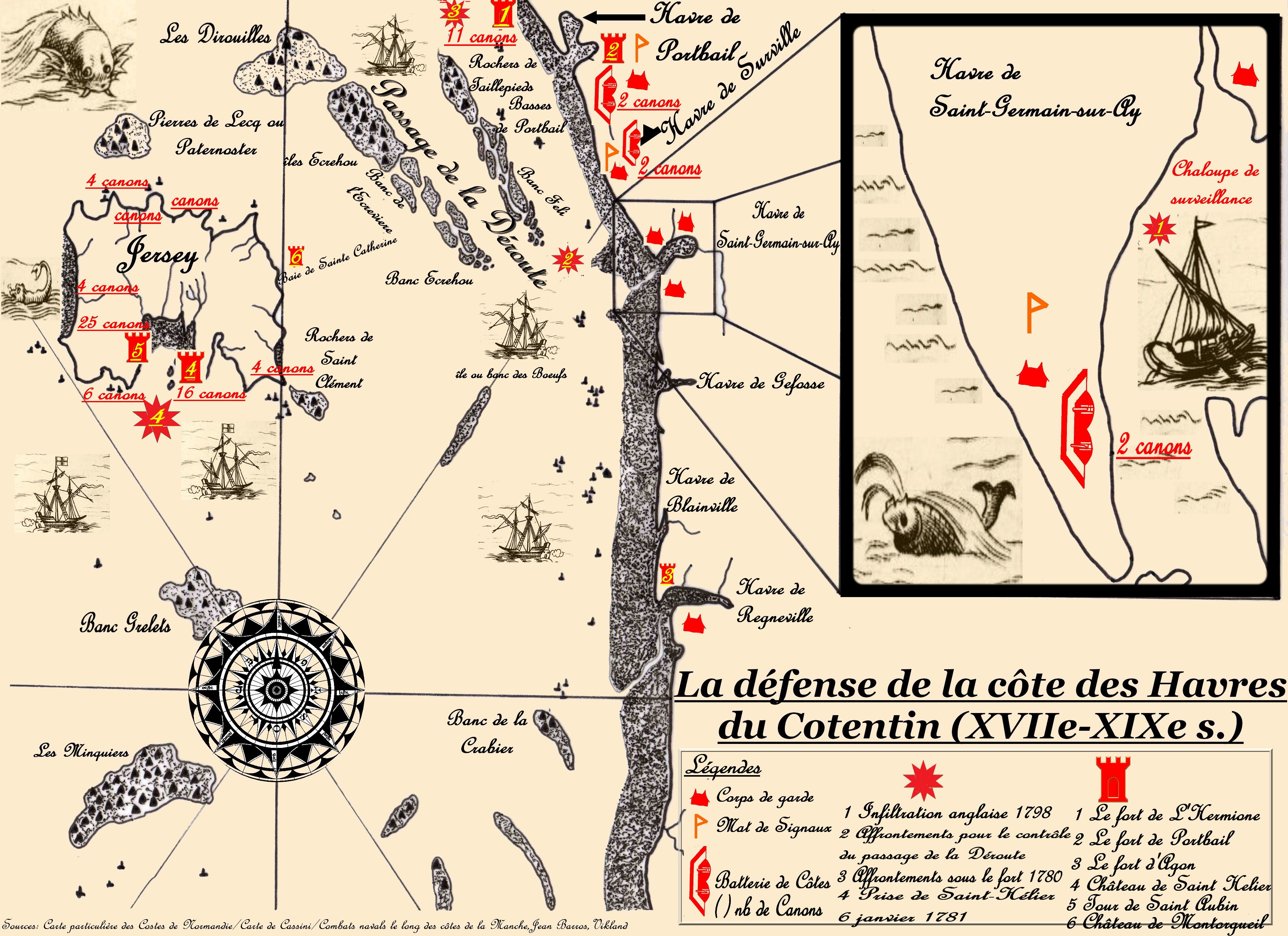 J'ai tenté de synthétiser plusieurs de mes lectures sur cette carte. Elle permet de mieux comprendre l'emplacement du passage de la Déroute, mais également l'enjeu stratégique qu'il représentait aux XVII-XIXe siècle. Pour la création, j'ai utilisé une carte que j'ai dessinée puis retouchée au logiciel. J'ai également utilisé 3 fichiers Wikicommons dont je cite le nom du fichier et l'auteur : - la rose des vents File:WInd Rose Aguiar.png de Alvesgaspar - l'étoile File:Étoile d'or.svg de Jérôme BLUM - la tour File:Map symbol historical 02.png de seamus mcgill (mcgill)